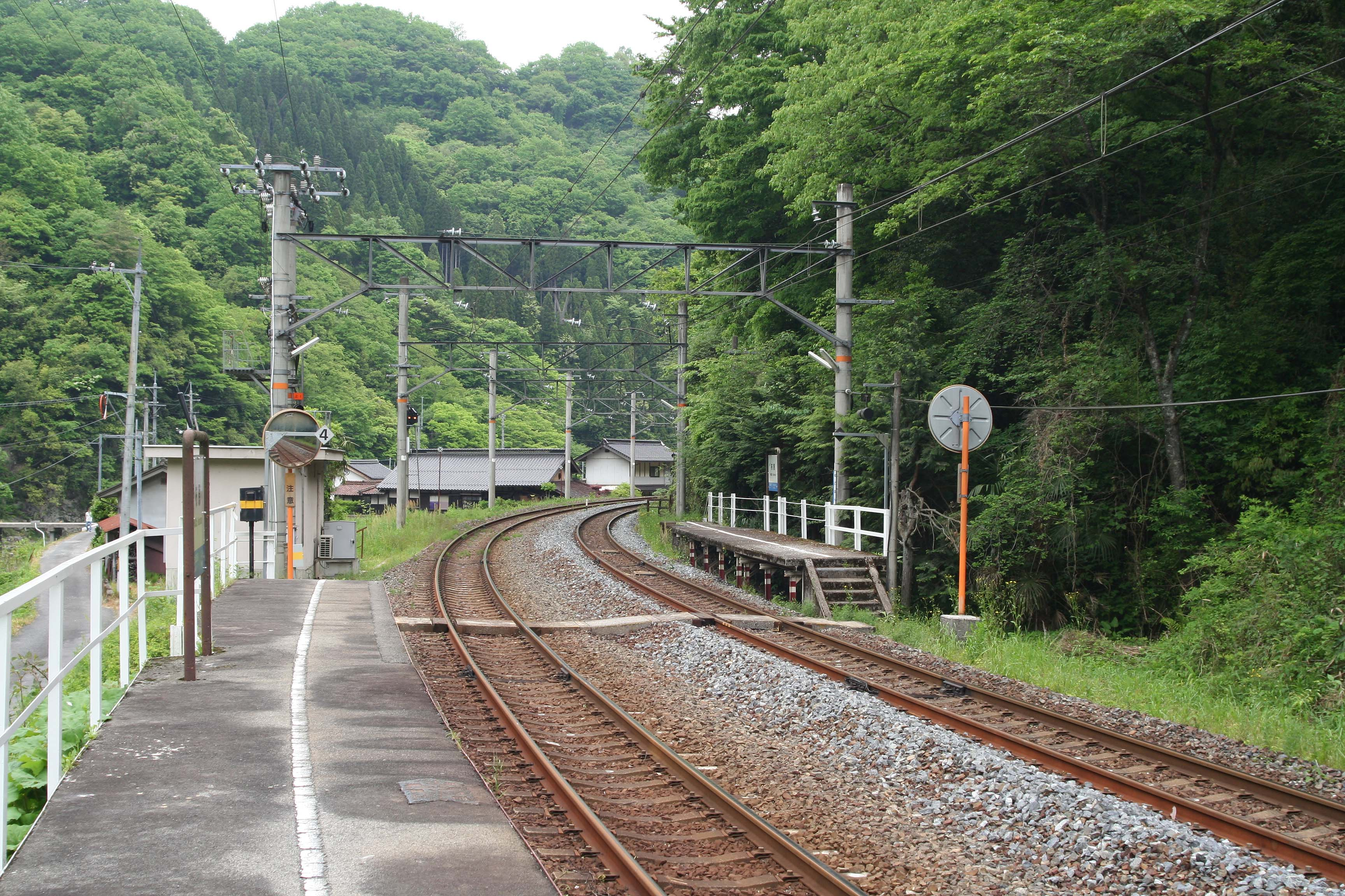 布原駅の構内